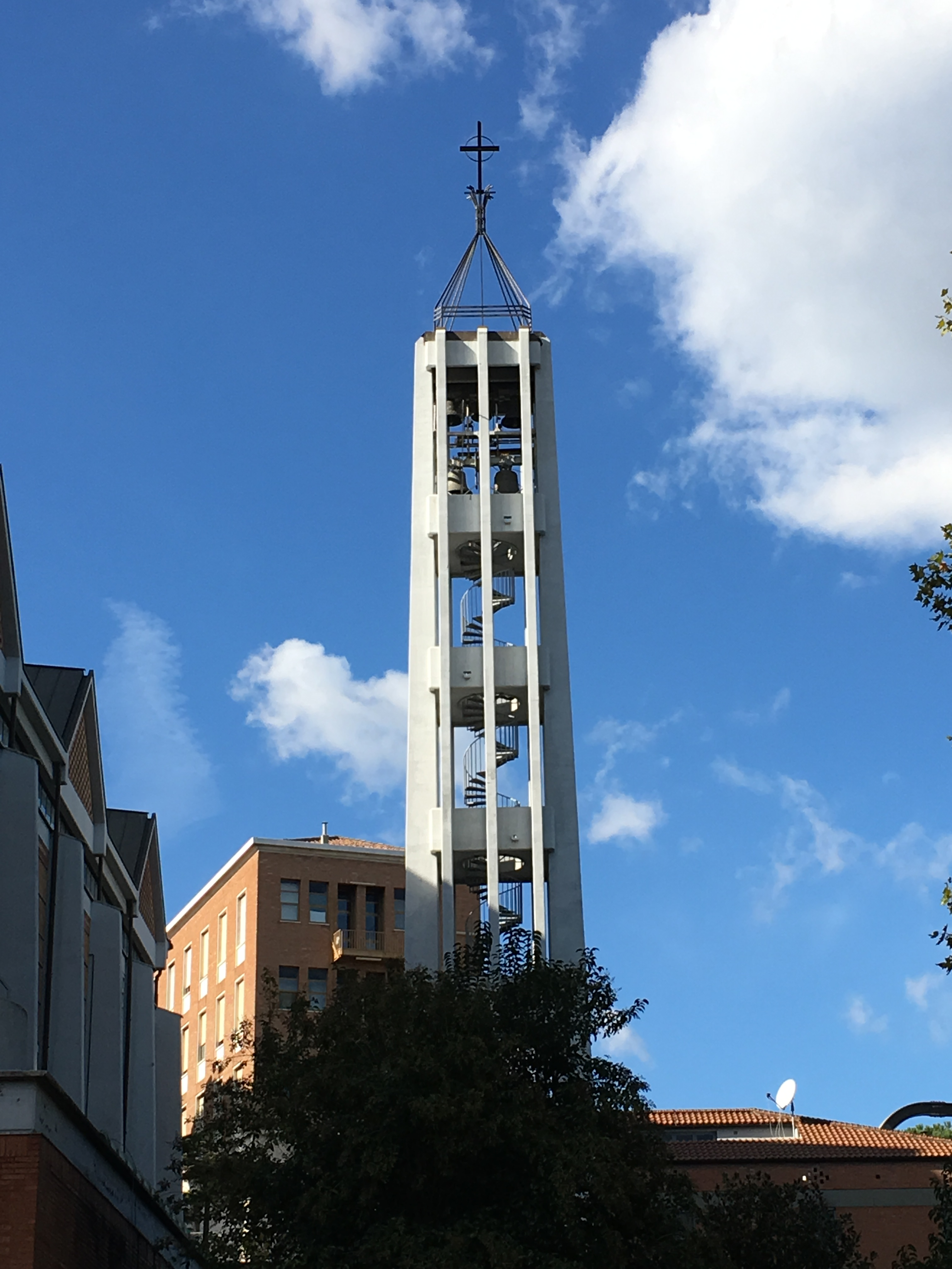 Parrocchia San Gregorio VII, il campanile